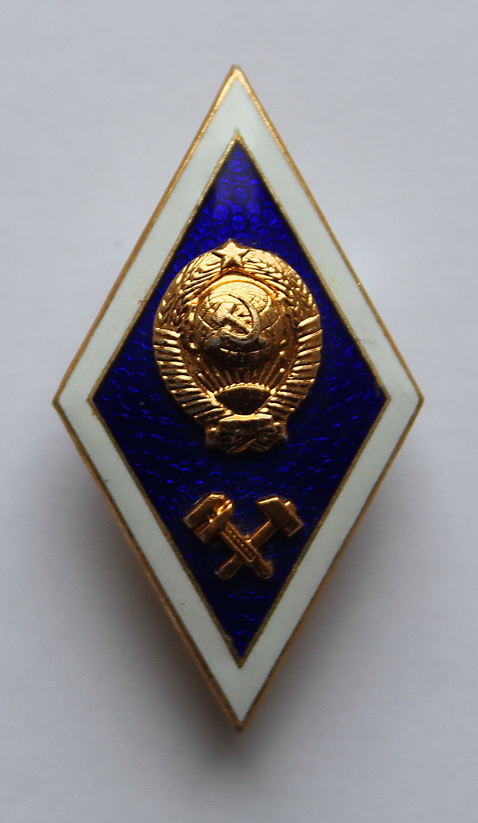 Нагрудний знак. Вища технічна освіта СРСР